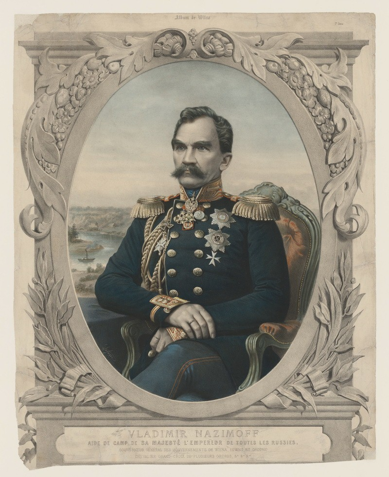 Lafosas, Adolfas/Vilčinskis, Jonas Kazimieras. Generalgubernatorius Vladimiras Nazimovas. XIX a. vid., spalvota litografija.